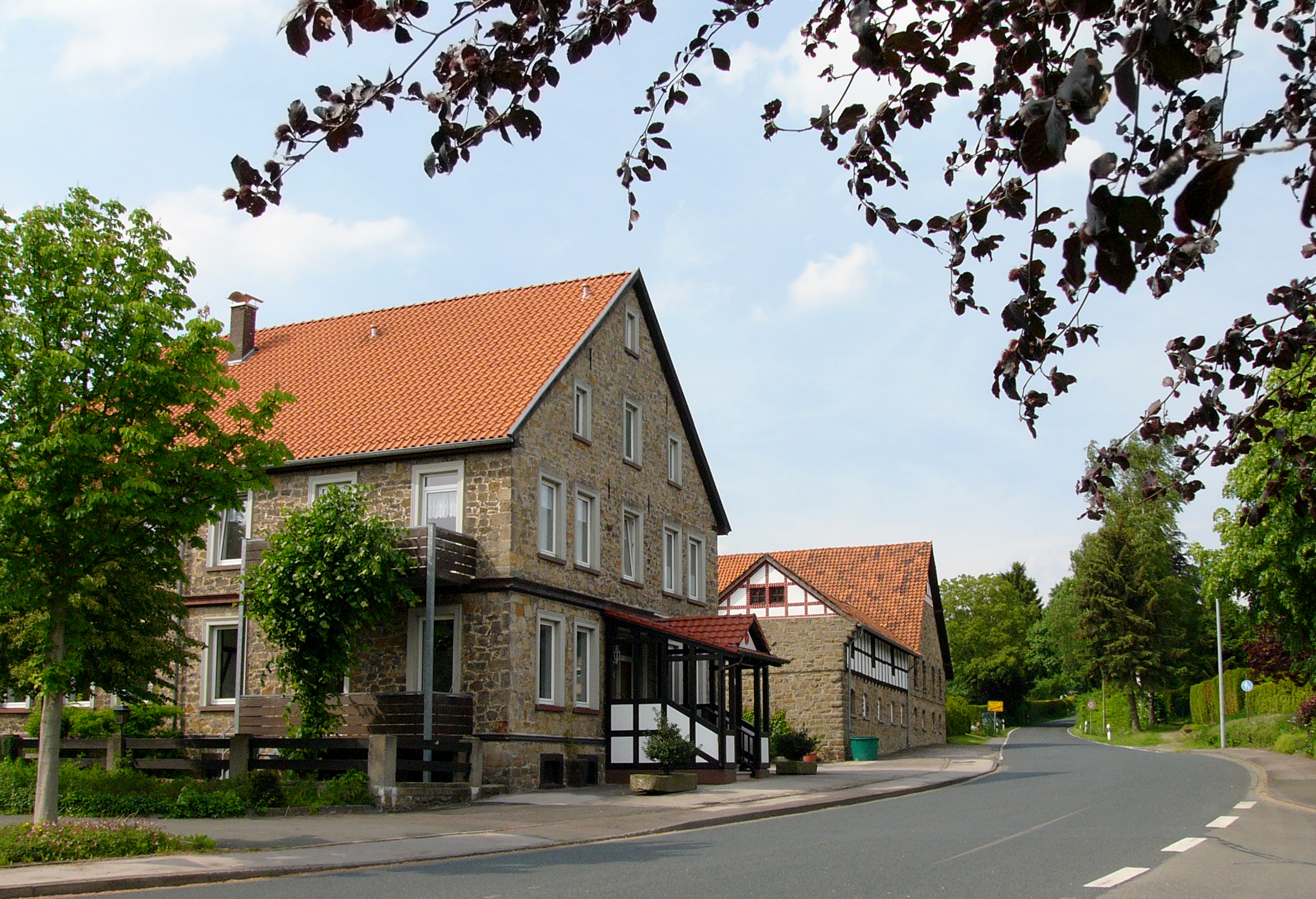 Ortsmitte von Brüntrup, Ortsteil von Blomberg, Germany